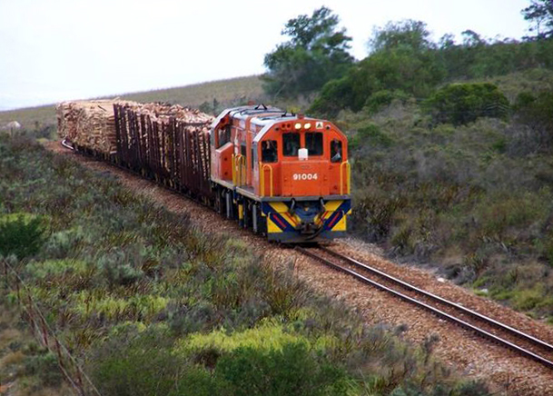 Güterverkehr März 2009 Nähe Kruitsfontain; SAR Klasse 91, GE UM6B